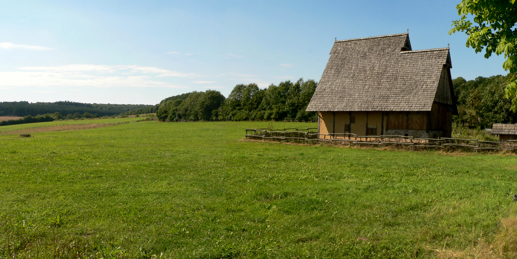 Nienover